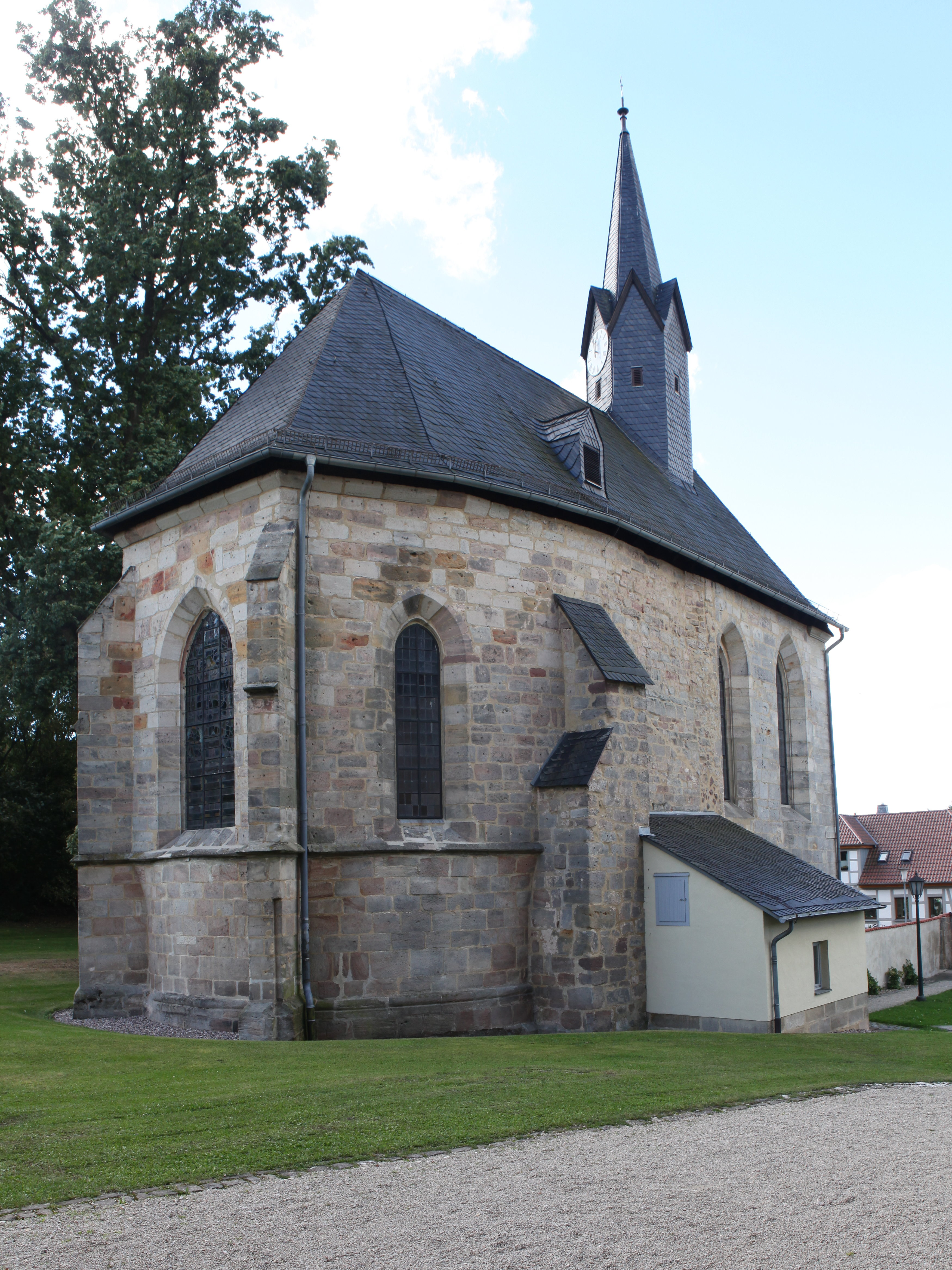 Evangelische Christuskirche in Rödental, OT Mönchröden, Landkreis Coburg